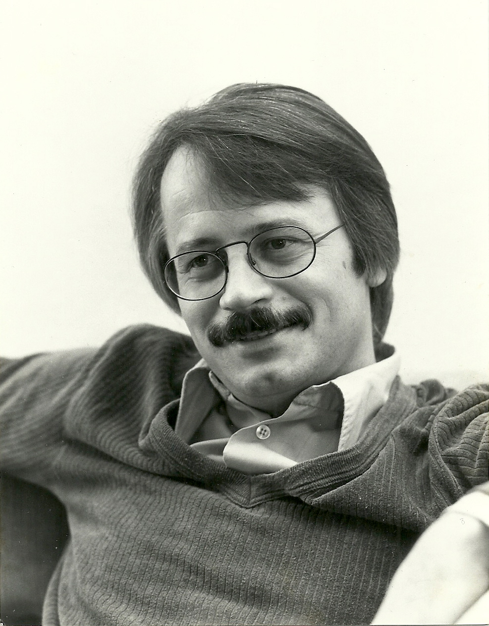 Porträtaufnahme von Zvonko Plepelić aus dem Jahr 1980